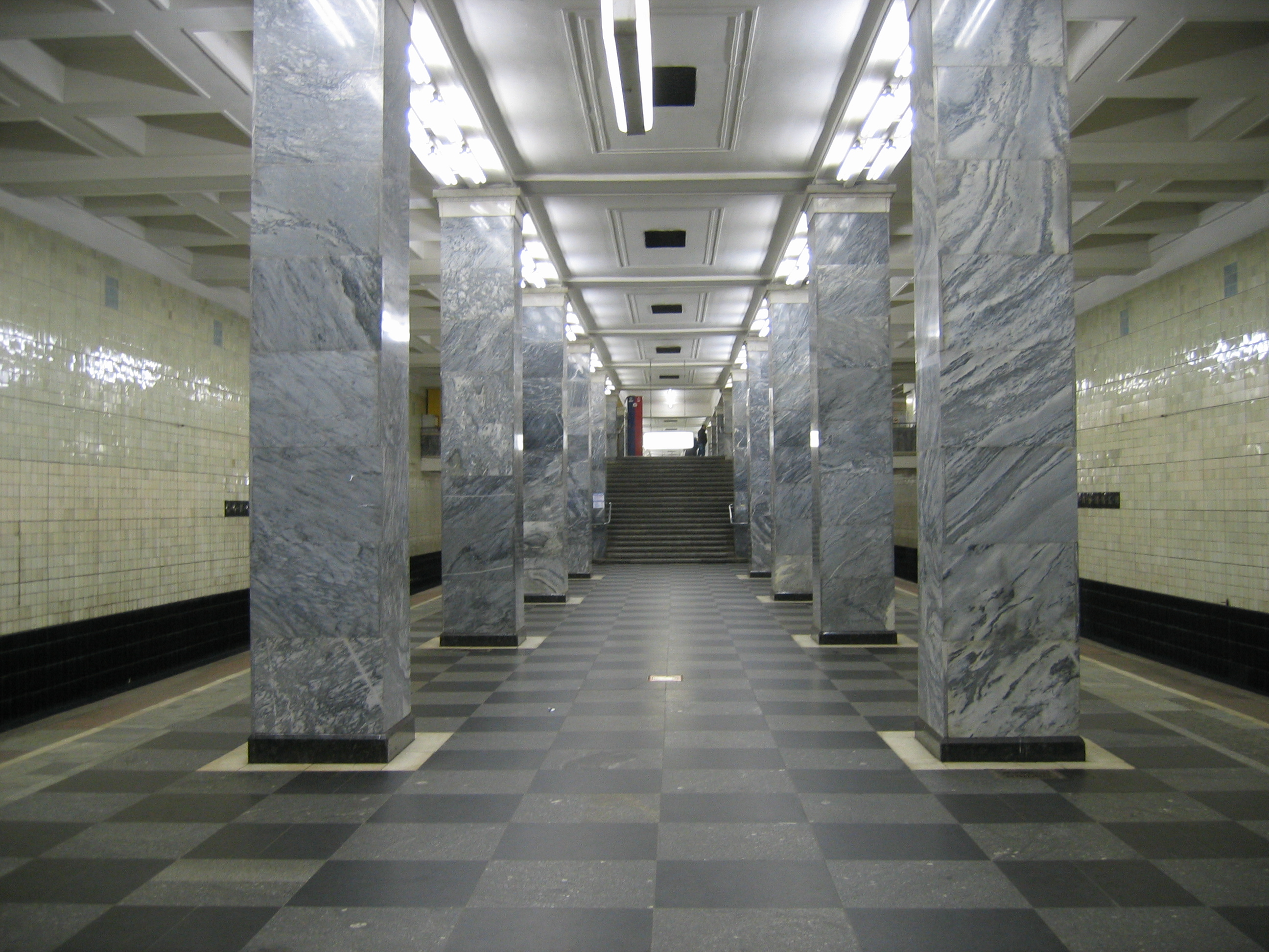 Московский метрополитен. Станция Сокольники